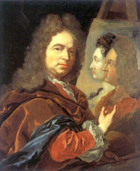 Selbstbildnis mit dem Bildnis des Kurfürstenpaares Johann Wilhelm und Anna Maria Luisa